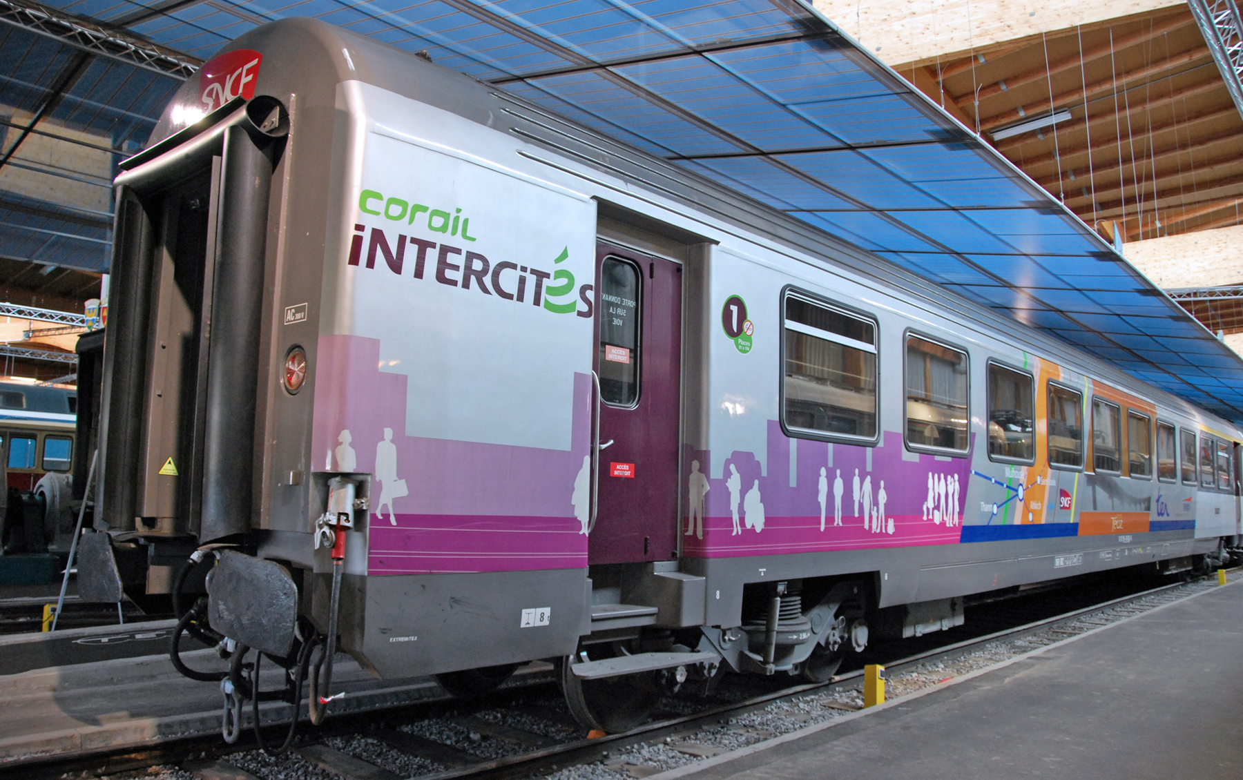 Corail cite du train